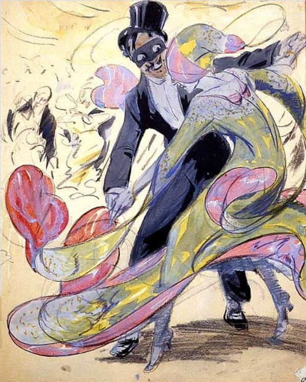 Bal Masqué de la Monnaie